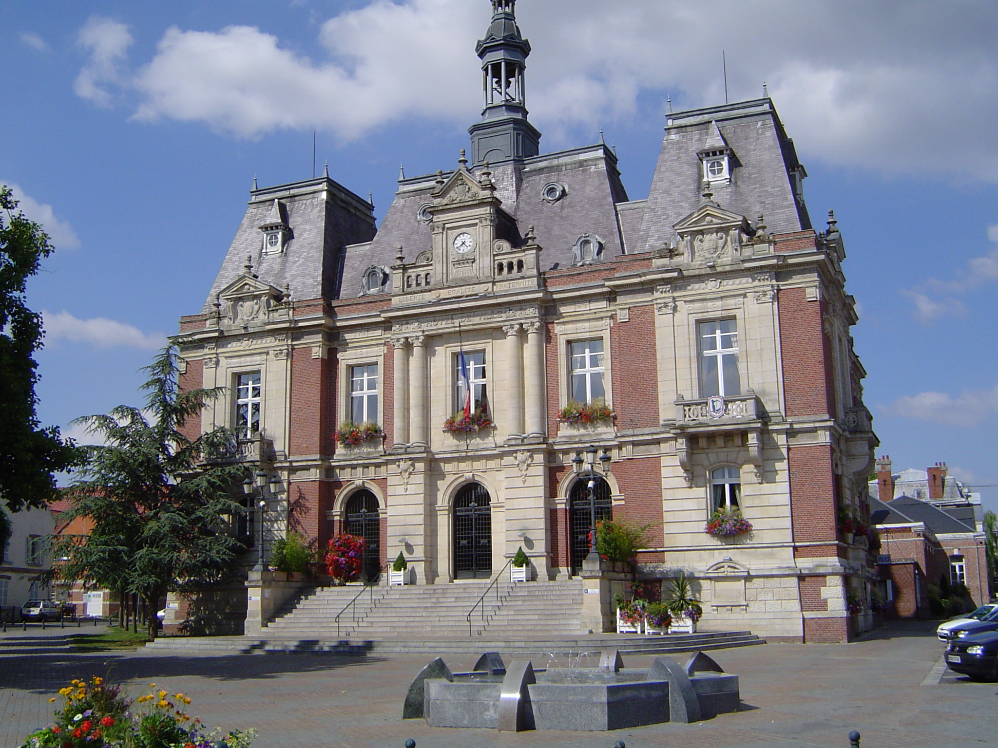 Photos prises dans la commune de Doullens (Somme)